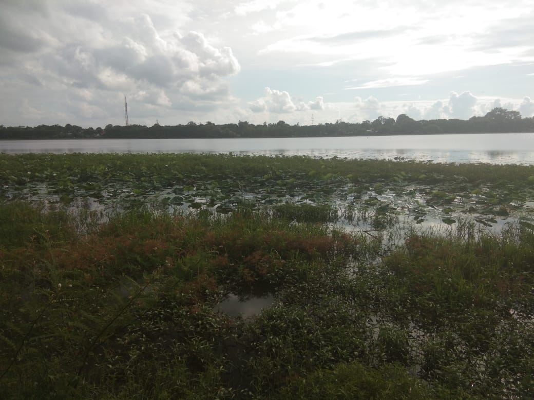 Danau Mawang ditumbuhi Bunga Teratai yang berbuah tiap tahunnya